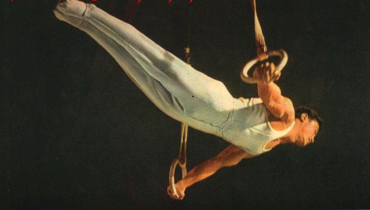 1962-04 1962年 体操运动员阮国良 吊环 水平十字